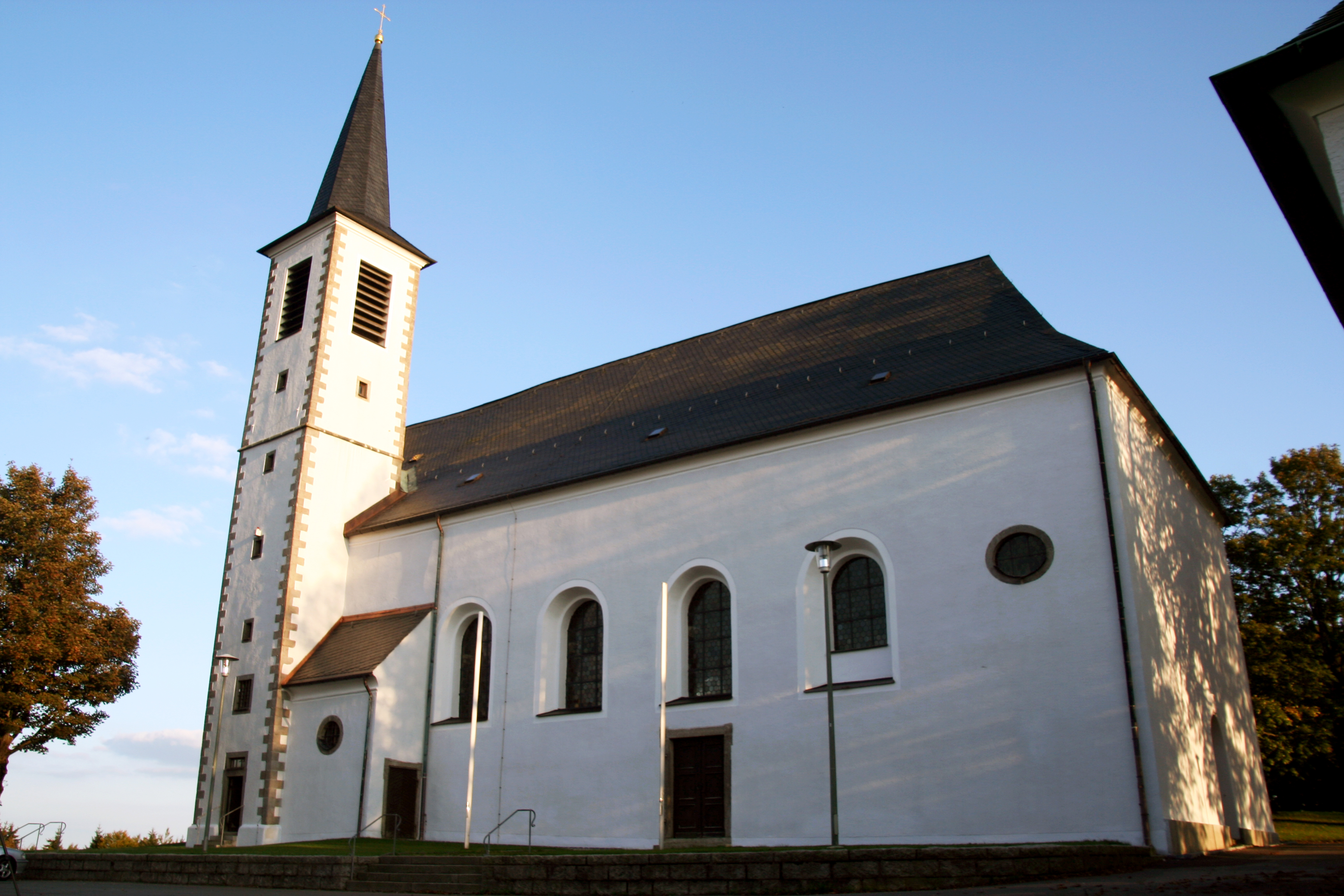 Wallfahrtskirche FahrenbergThis is a photograph of an architectural monument.